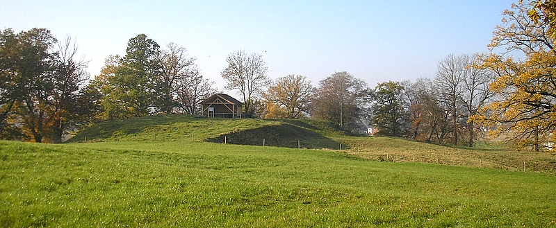 Burgstall Dasing (Landkreis Aichach-Friedberg, Bayerisch-Schwaben). Gesamtansicht von Süden. Eigene Aufnahme, Nov. 2007 / Former Dasing Castle near Augsburg (Bavaria, Germany). Total view from the south. Own photo, Nov. 2007